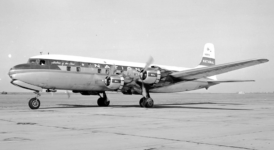 Taxi at Oakland 1954.